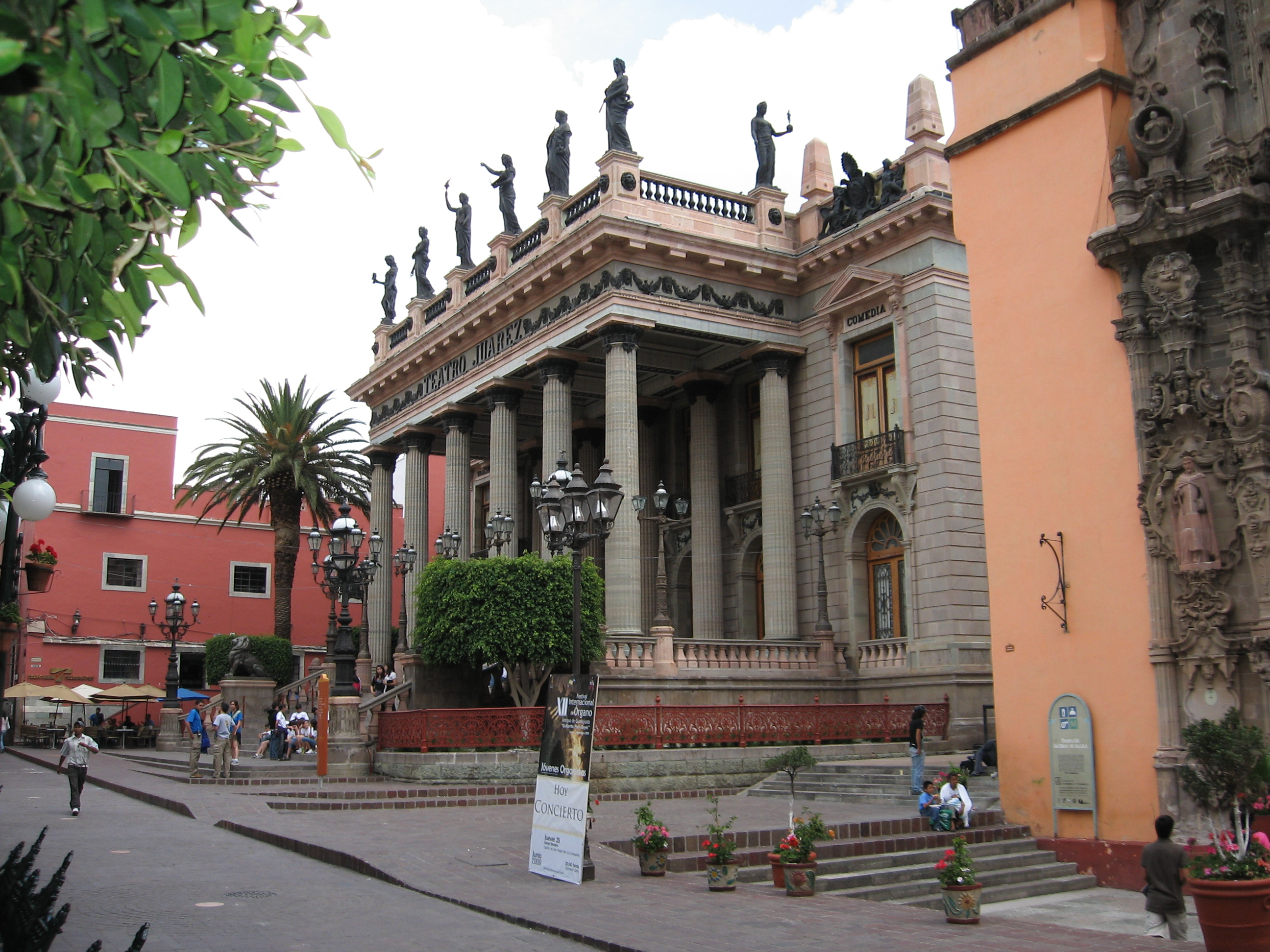 Teatro juarez Guanajuato